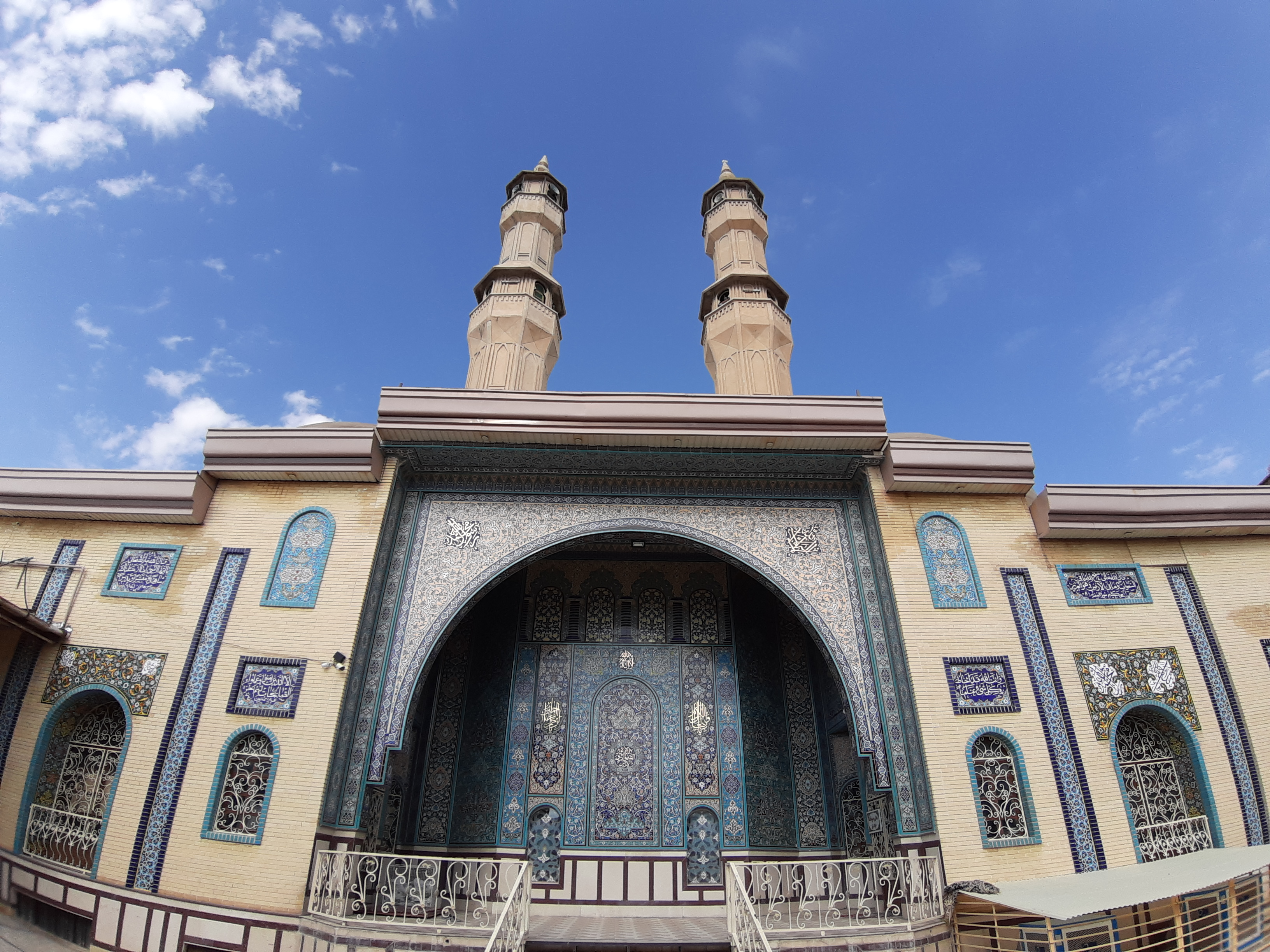 مسجد جامع شافعی